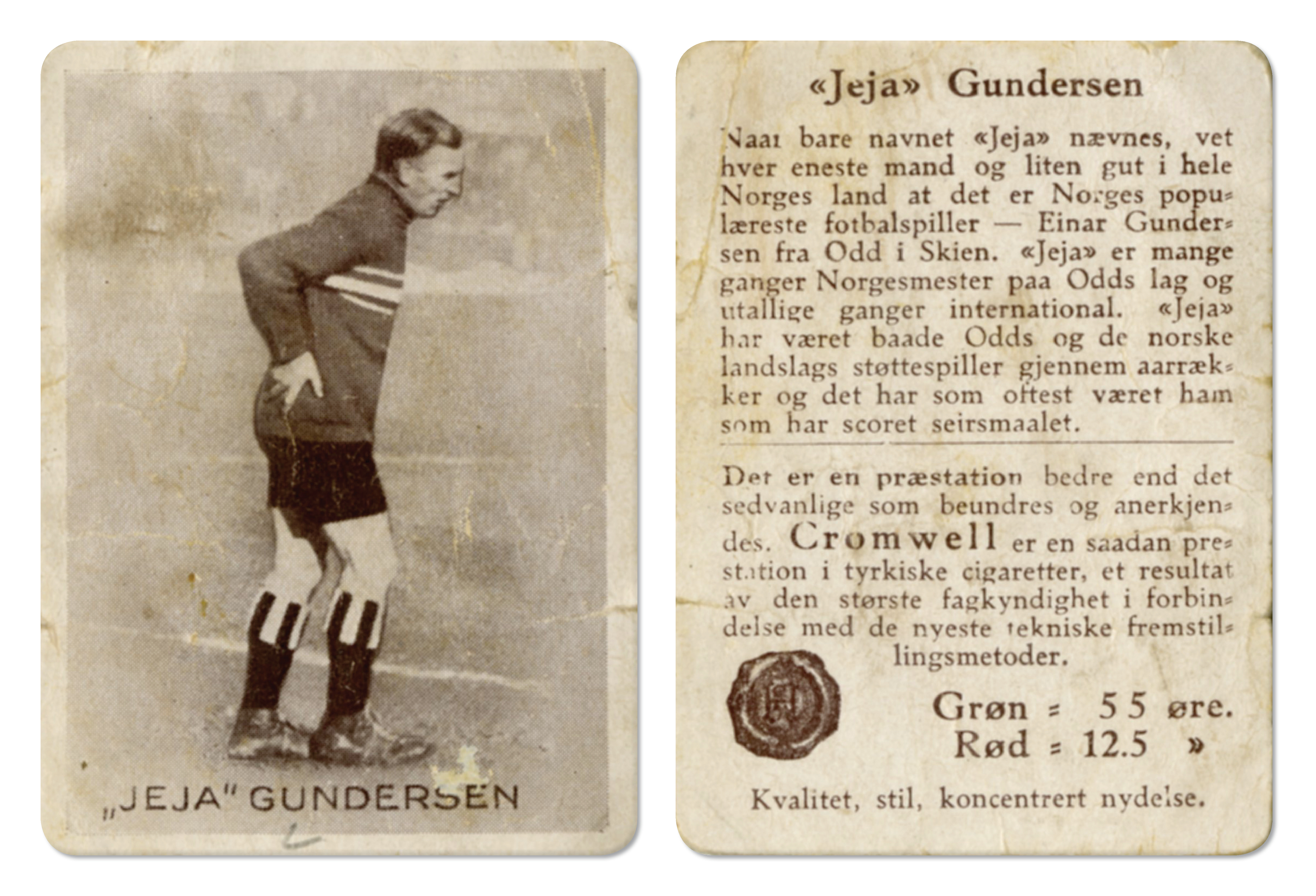 Format: Samlekort Dato / Date: ca. 1930 (dokumentet) Fotograf / Photographer: Ukjent Wikipedia: Einar Gundersen (1896 - 1962) Eier / Owner Institution: Trondheim byarkiv, The Municipal Archives of Trondheim Arkivreferanse / Archive reference: Sportsklubben Freidig: Sigarettfoto ca. 1930 (Løpenr. 75) F23940 Tekst på baksiden: "Jeja" Gundersen - Naar bare navnet "Jeja" nævnes, vet hver eneste mand og liten gut i hele Norges land at det er Norges populæreste fotbalspiller - Einar Gundersen fra Odd i Skien. "Jeja" er mange ganger Norgesmester paa Odds lag og utallige international. "Jeja" har været baade Odds og de norske landslags støttespiller gjennem aarrækker og det har som oftest været ham som har scoret seiersmaalet. Merknad: Disse samlekortene med bilder av norske og internasjonale idretthelter fulgte med i sigarettpakker på 1920 og 30-tallet - derav tobakksreklamen på baksiden. Samlekortene kommer fra Sportsklubben Freidigs arkiv, og inneholder nærmere 90 unike kort pent plassert i et samlealbum. Samleren var den senere skipsmegler Finn Følling (1914 – 1985).